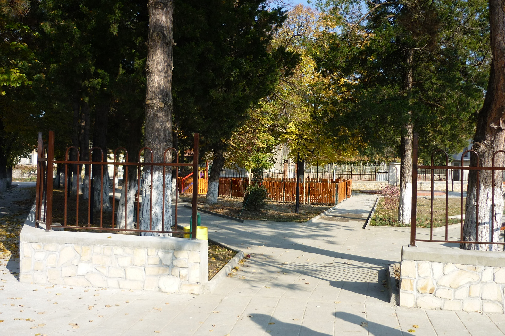 Градинката в центъра на селото